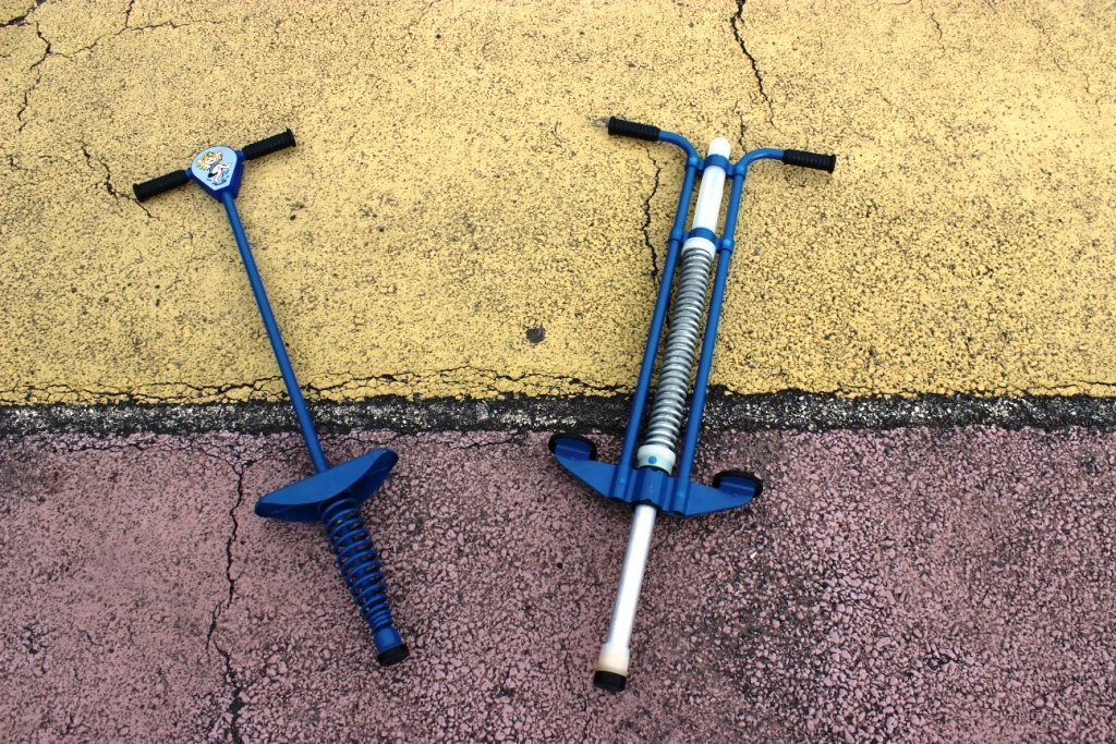 Тренажеры "Кузнечик-3" и "Кузнечик-4" российского производства